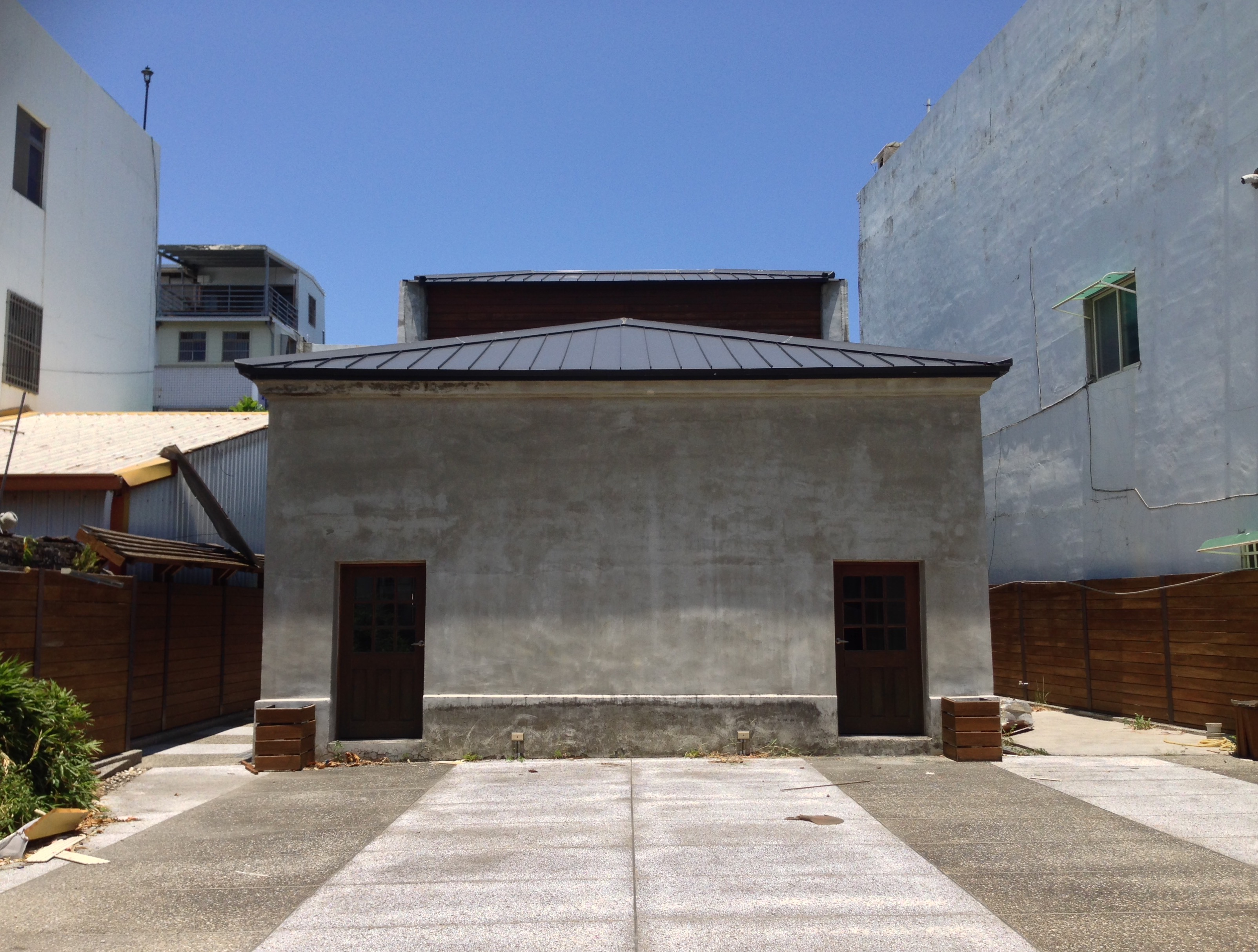 中華會館台東分社背面